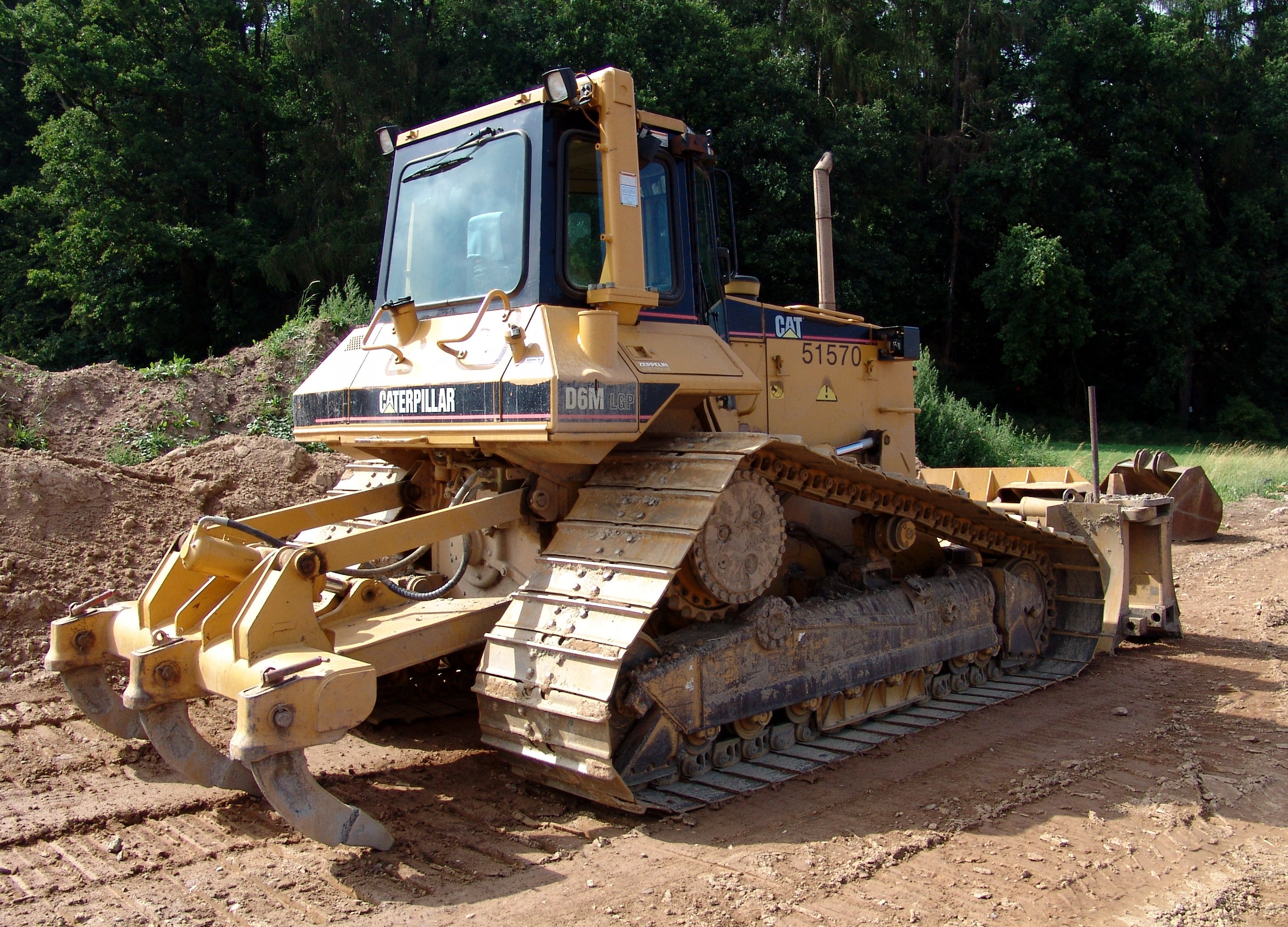 Caterpillar D6M Planierraupe